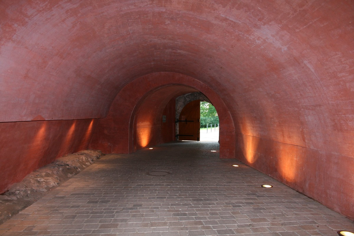 Schloss Senftenberg Zugangspoterne